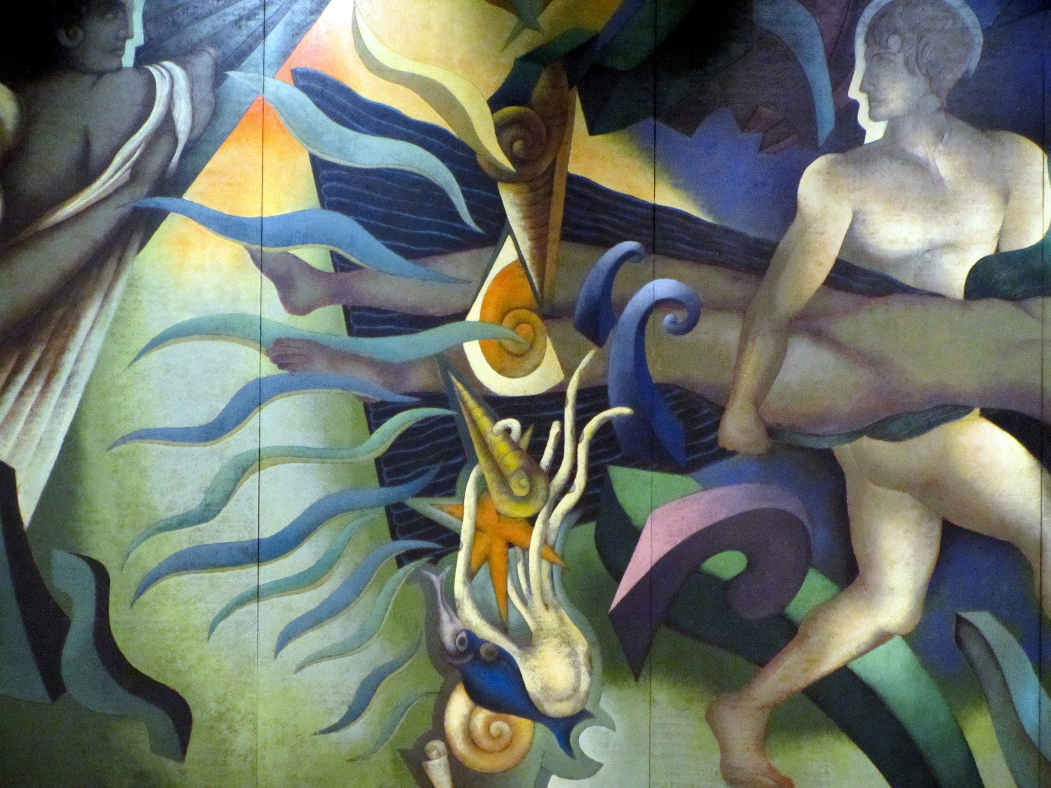 Tributo a nuestro océano, mural del pintor chileno Mario Toral que forma parte de la gran obra titulada Memoria visual de una nación, metro Universidad de Chile, en Santiago de Chile. Este panel está sobre el túnel poniente.